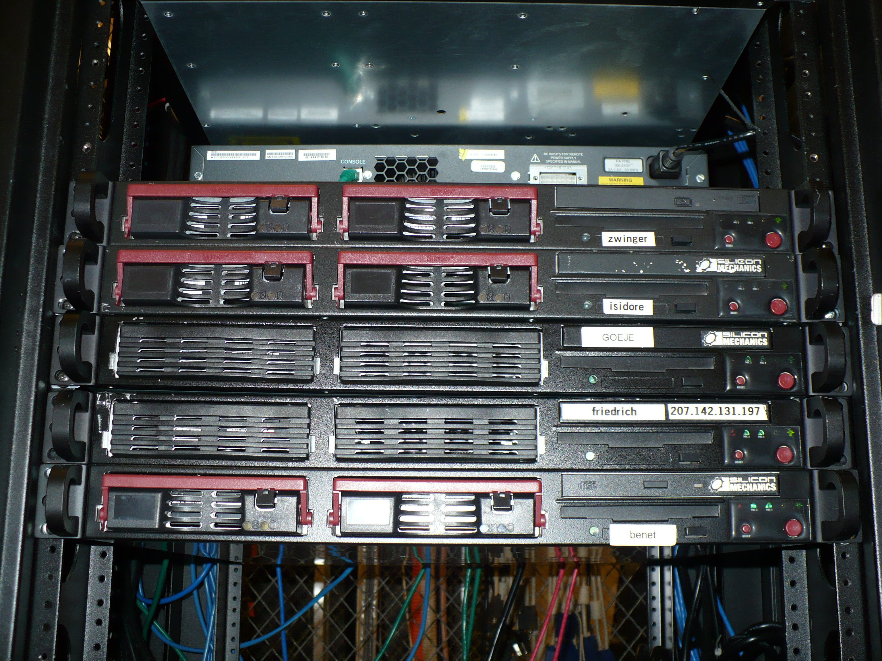 Wikimedia Servers